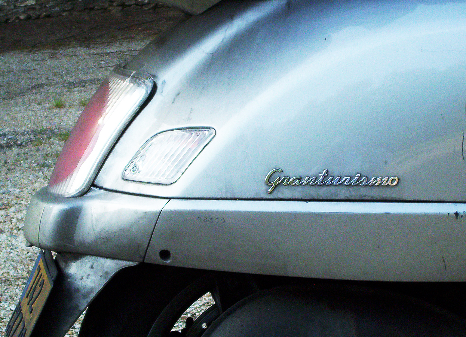 Sigle Vespa Granturismo